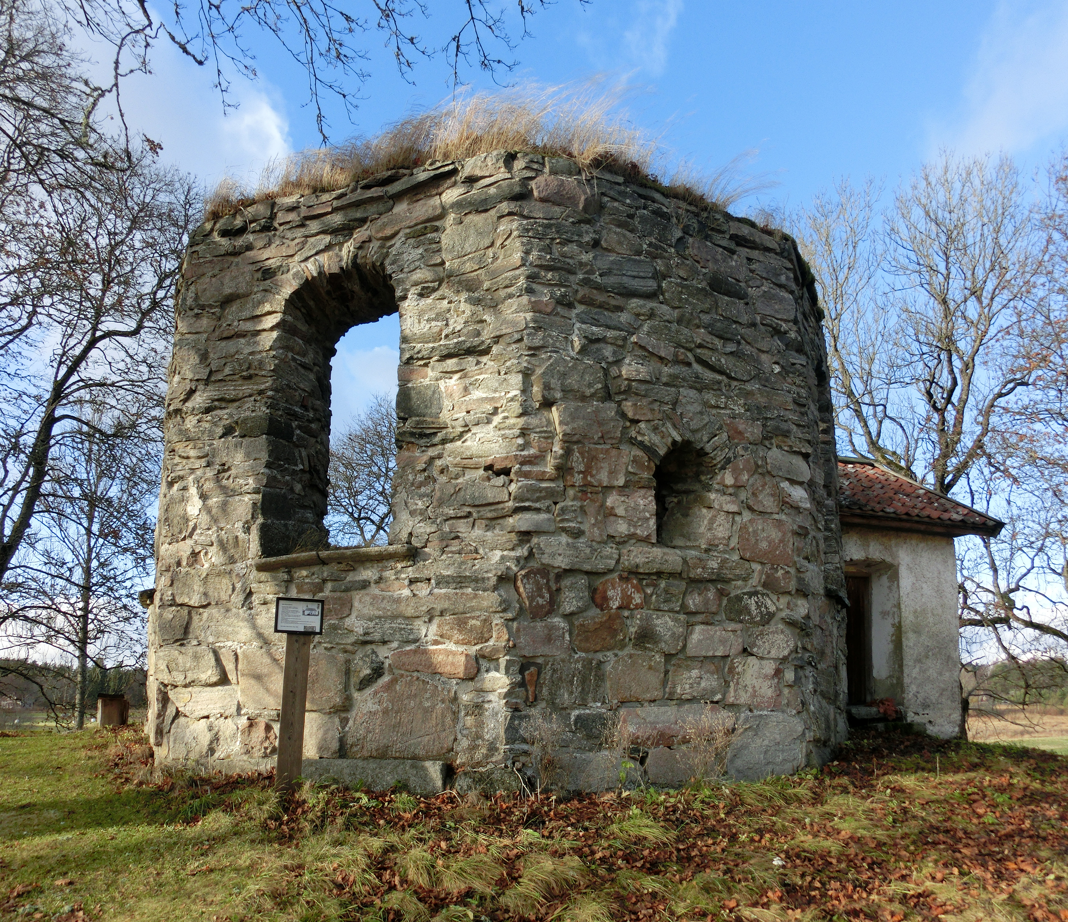 Södra Härene kyrkoruin (RAÄ-nr Södra Härene 5:1) i Södra Härene socken, Kullings härad, Vårgårda kommun, Västergötland, Västra Götalands län, Sverige.